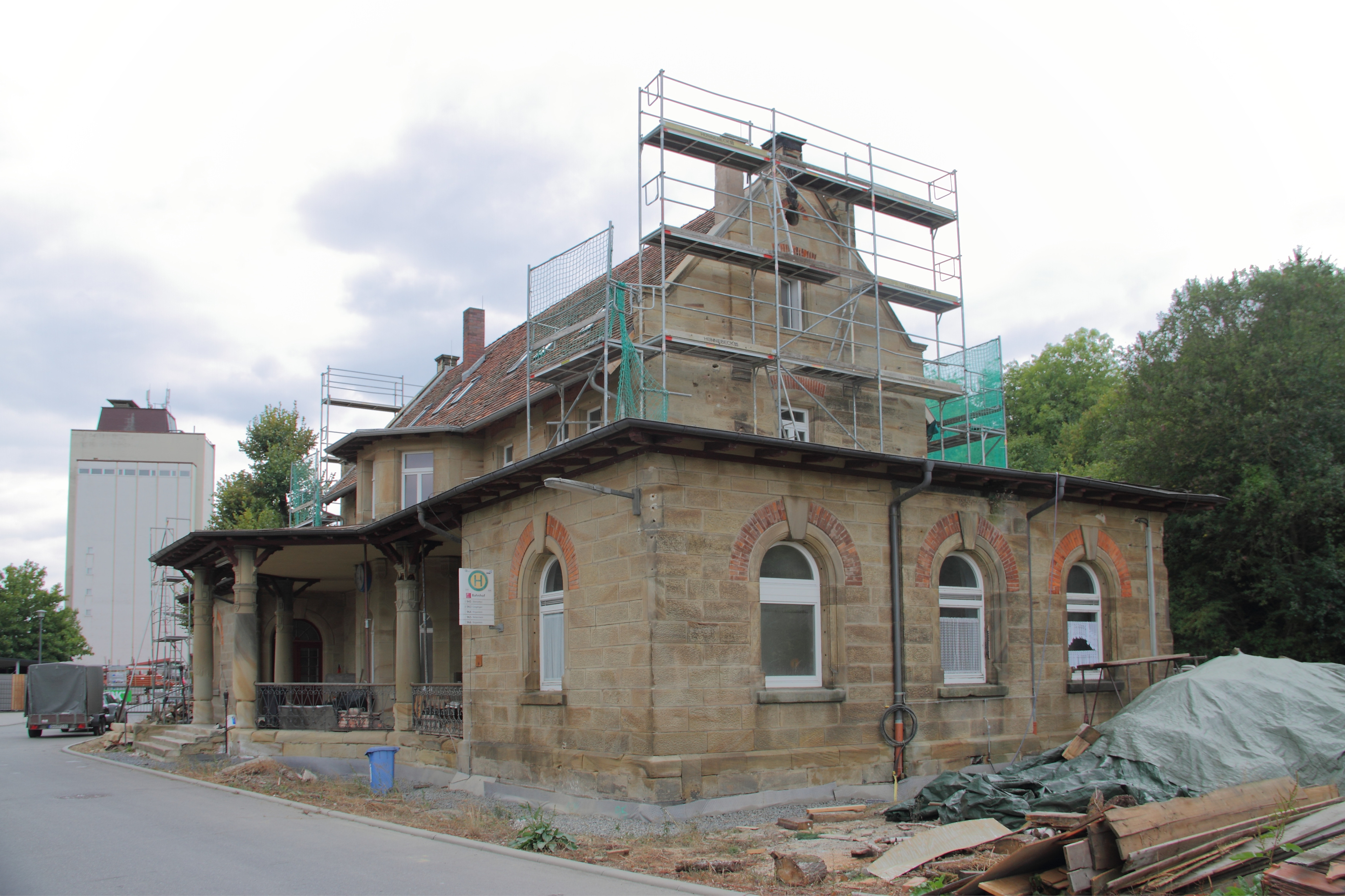 Das denkmalgeschützte Bahnhofsgebäude von Niederstetten wartet im Jahr 2018 noch auf seine endgültige Renovierung.